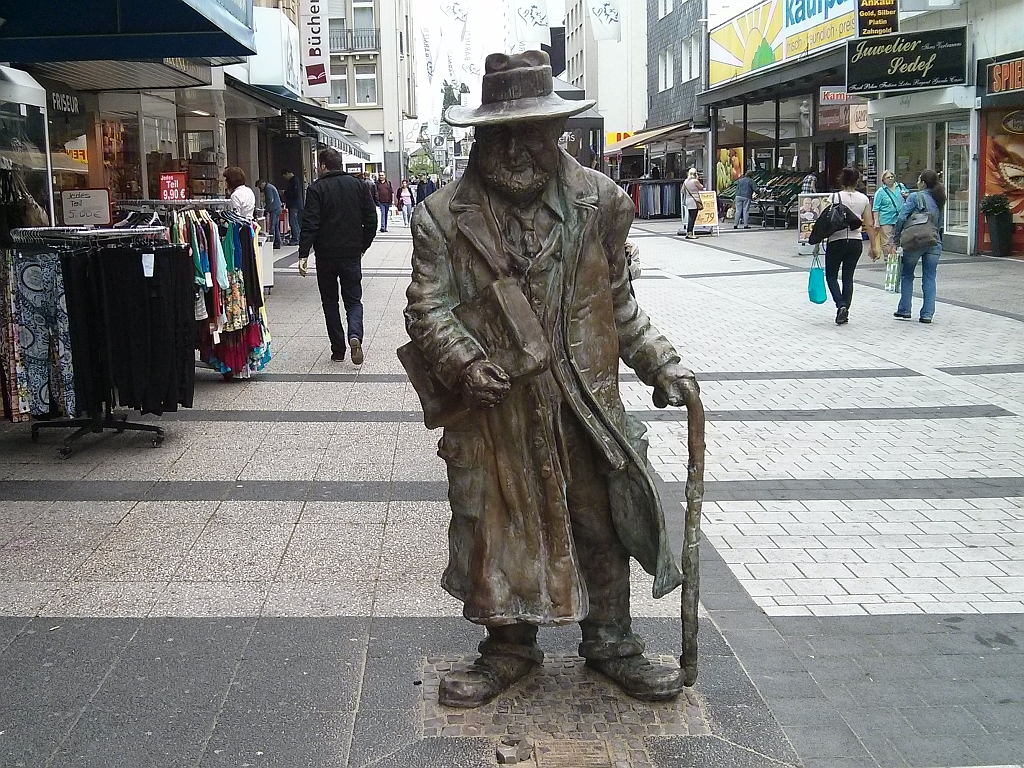 Husch Husch